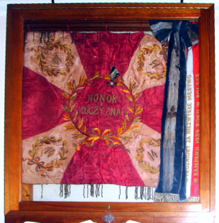 eksponaty Muzeum im. Sikorskiego w Londynie. Sztandar 14 pułku ułanów jazłowieckich